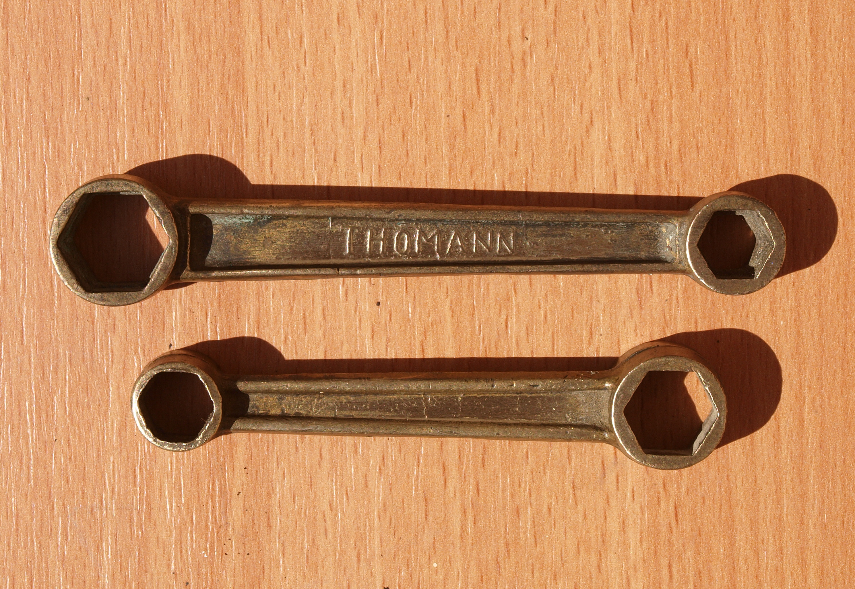 Clés de cycliste pour le dépannage, sur route, des vélos.